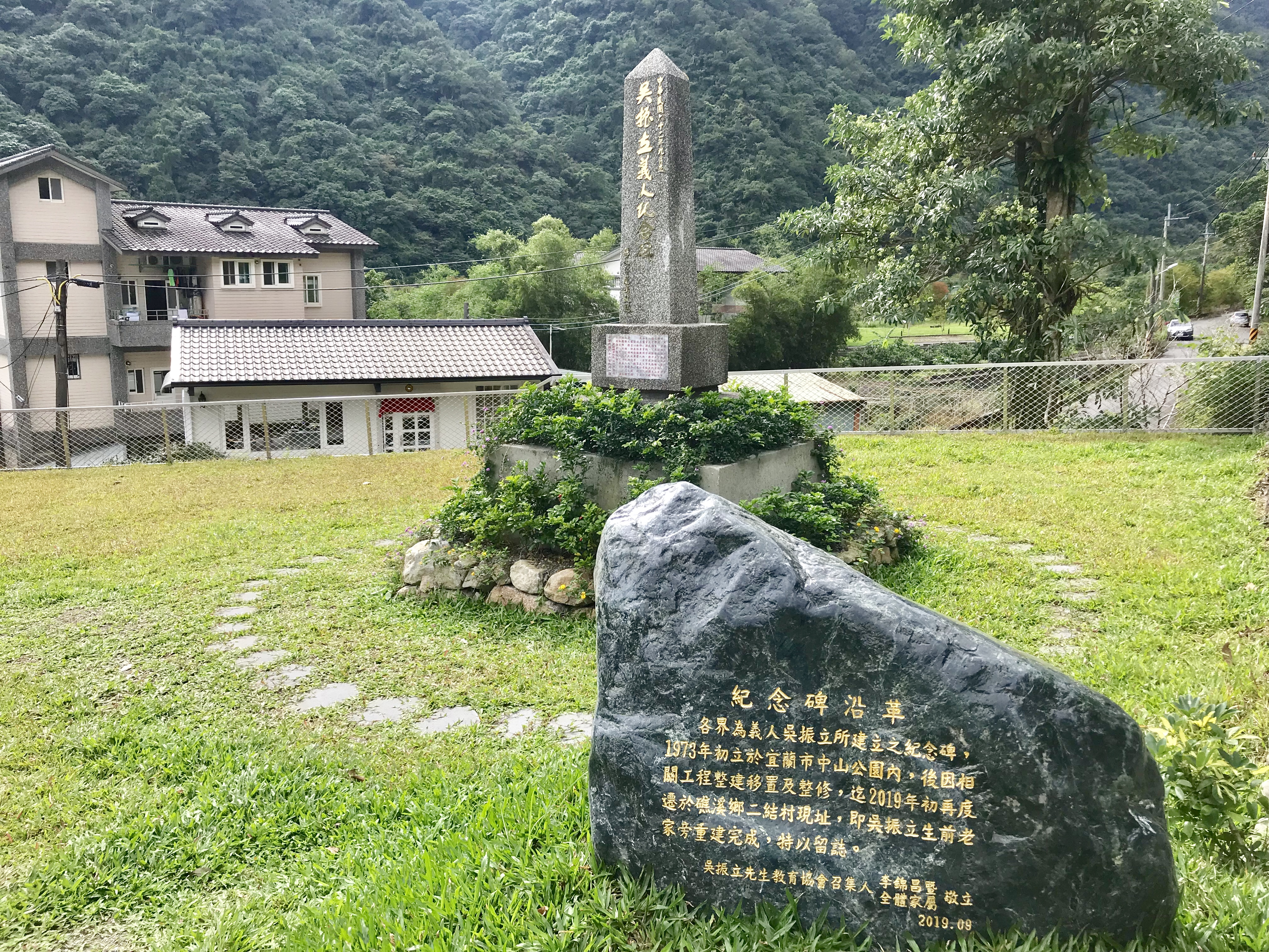 吳振立義人紀念碑